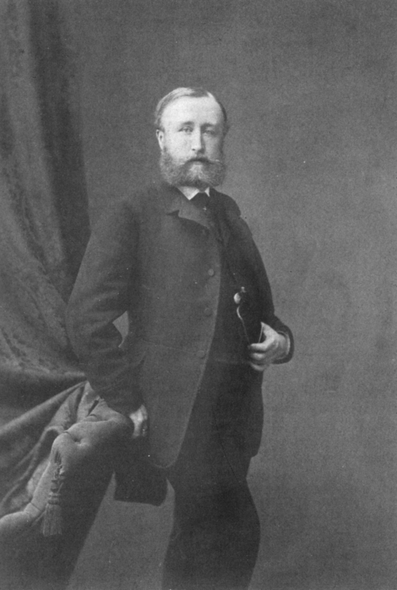 Raban von Helmstatt (1844-1932), reprd. in Heiberger: Handschuhsheim, Heidelberg 1985, S. 153